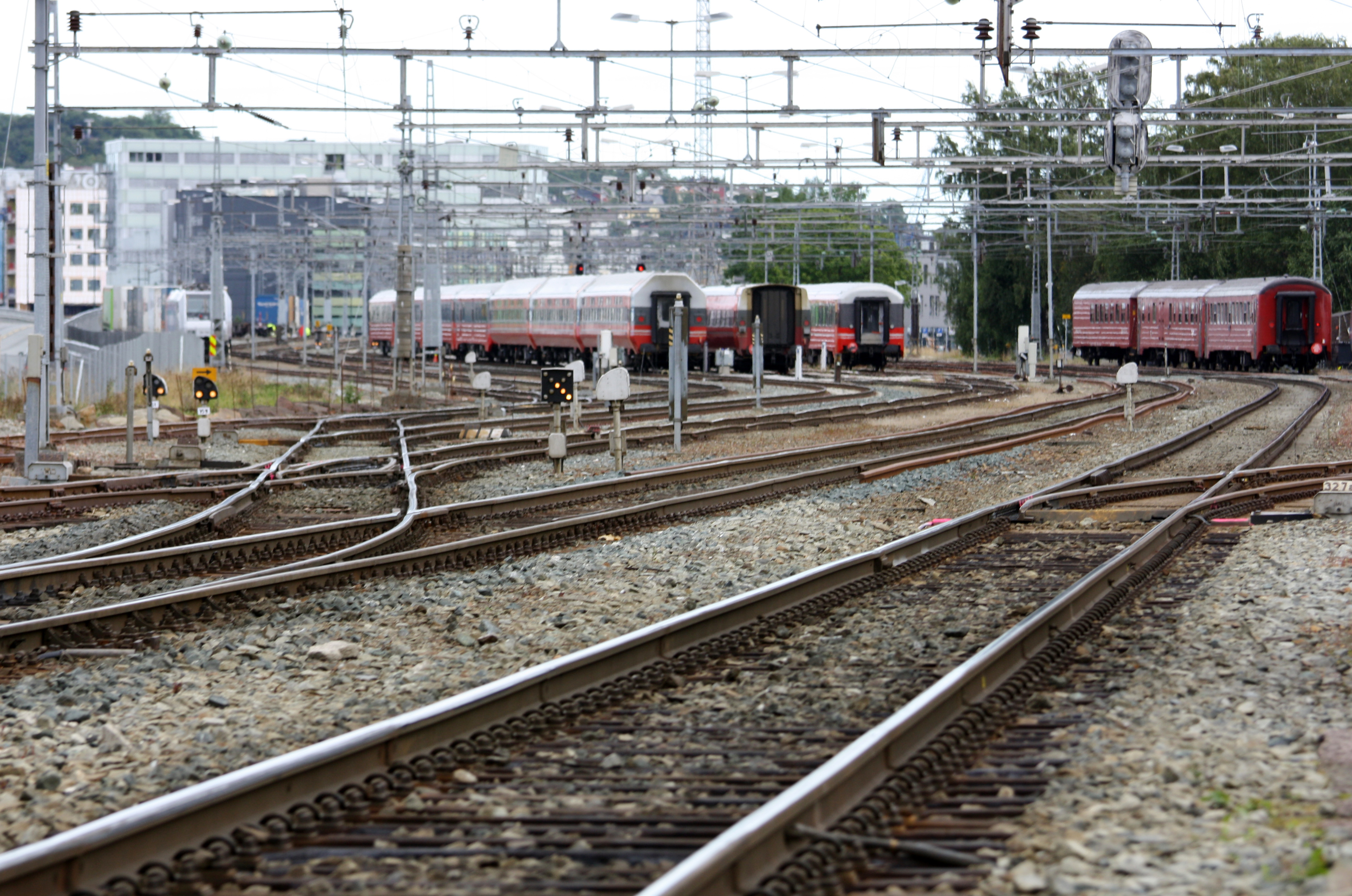 Spor på vei inn mot godsterminal og Trondheim sentralstasjon.